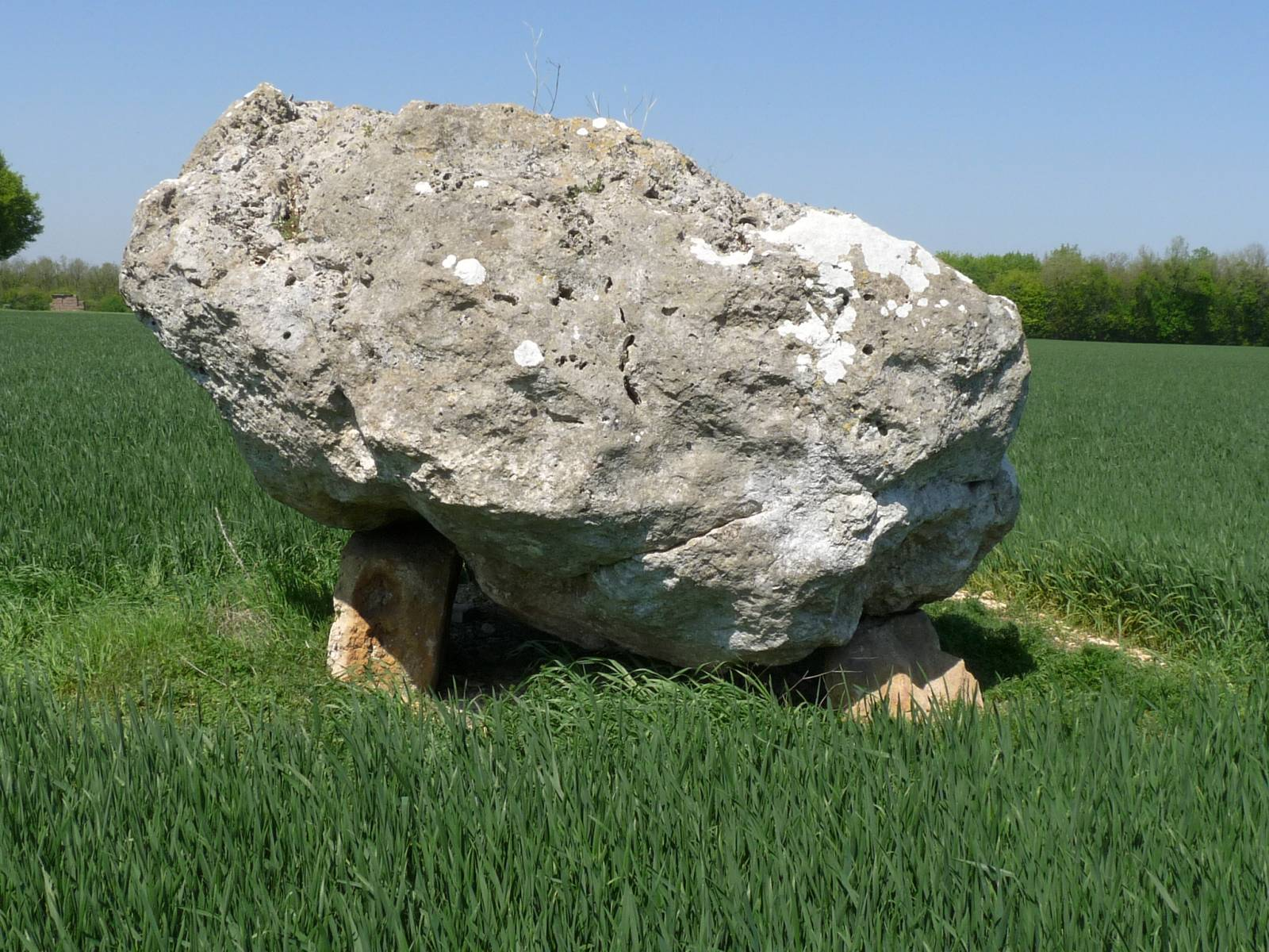 La Pierre Blanche, Bessé, Charente, France